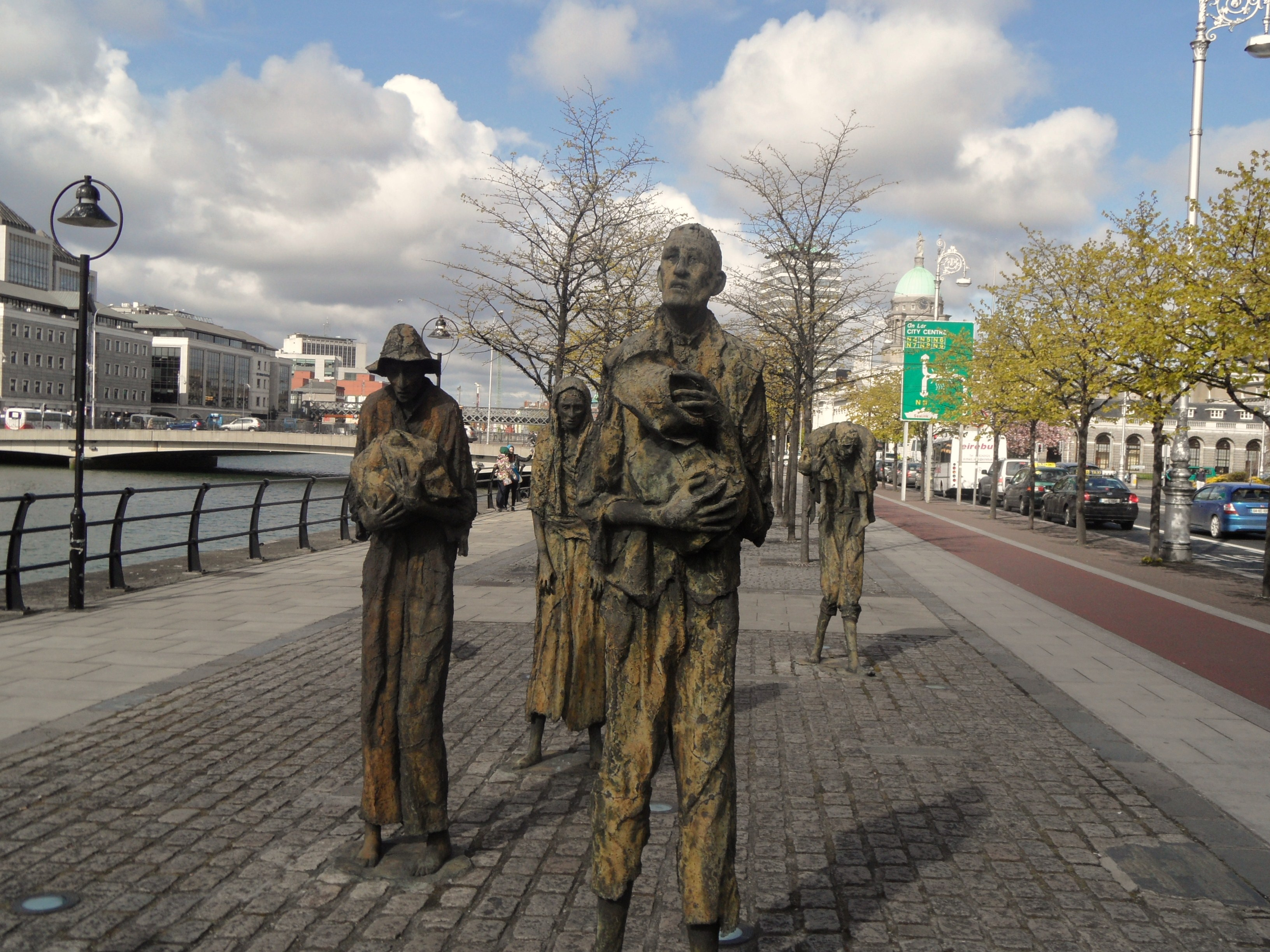 next to River Liffey (Custom House Quay) in Dublin